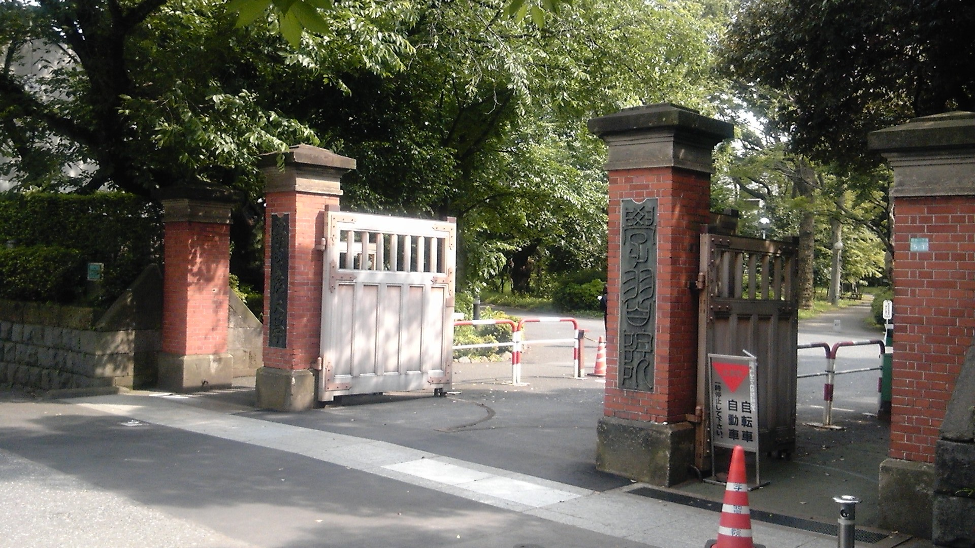 学習院大学正門